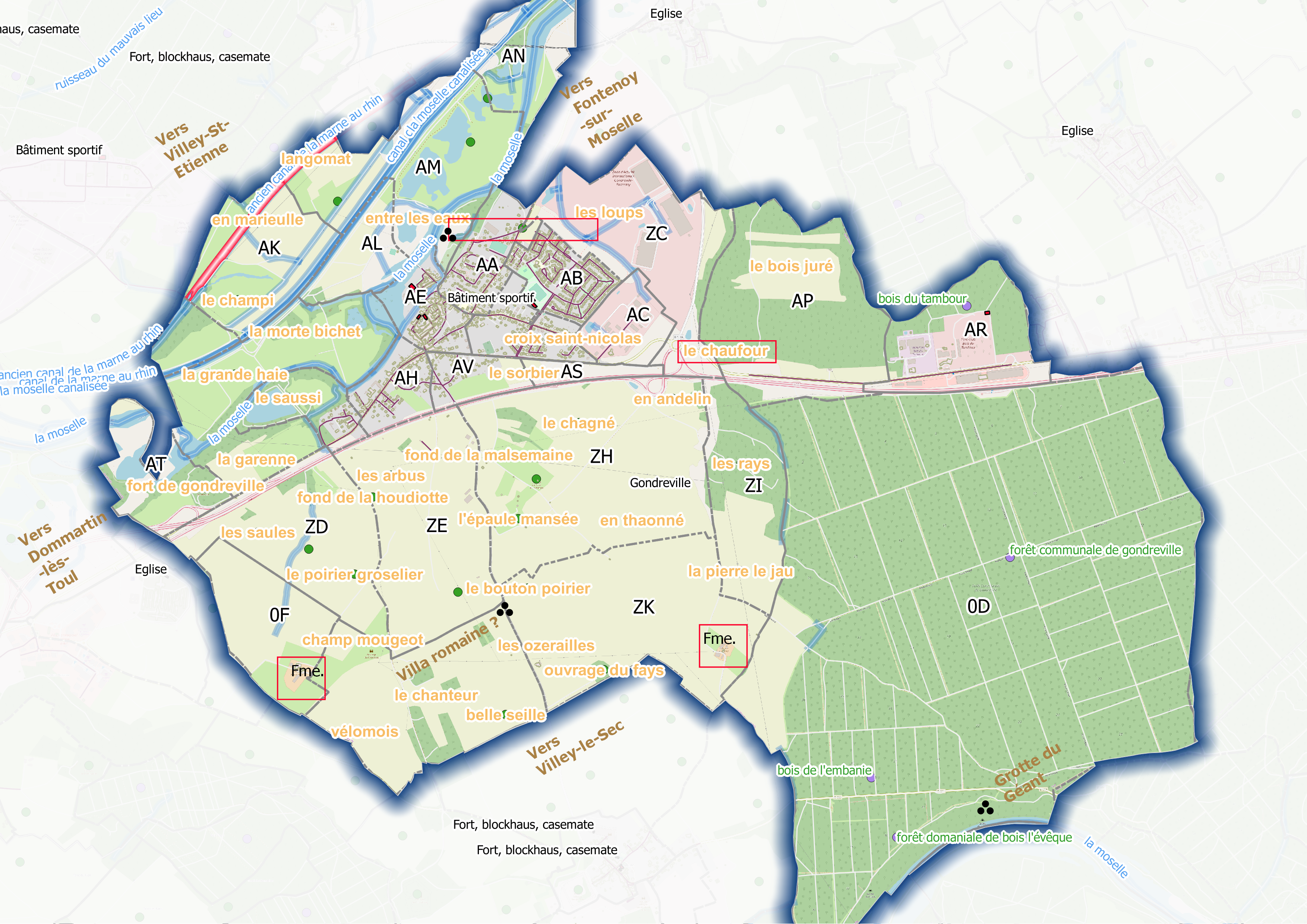 Gondreville (ban communal) - Qgis et OSM